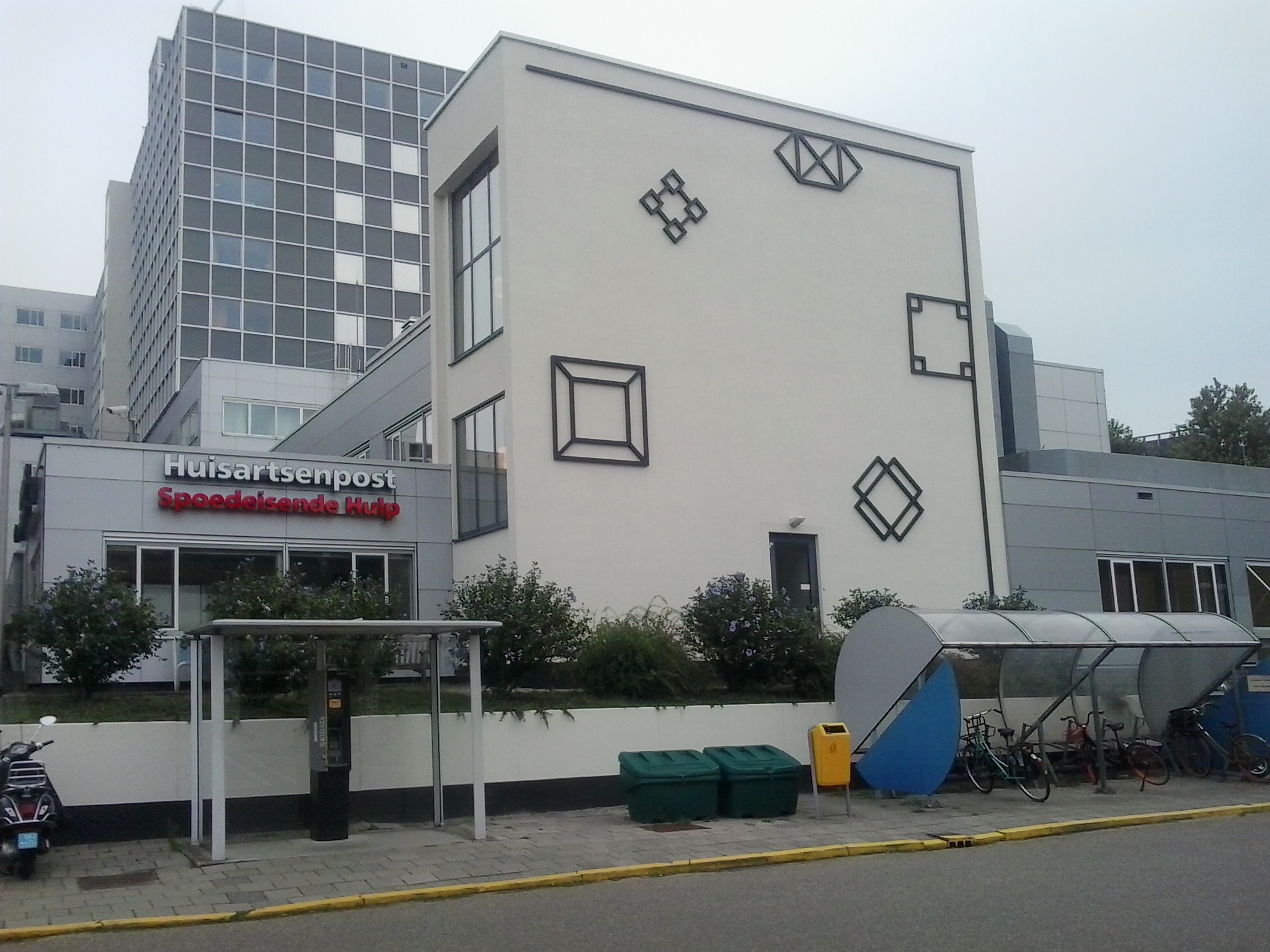 De afdeling Spoedeisende Hulp van OLVG, locatie West, huisartsenpost en zuidelijke muur.